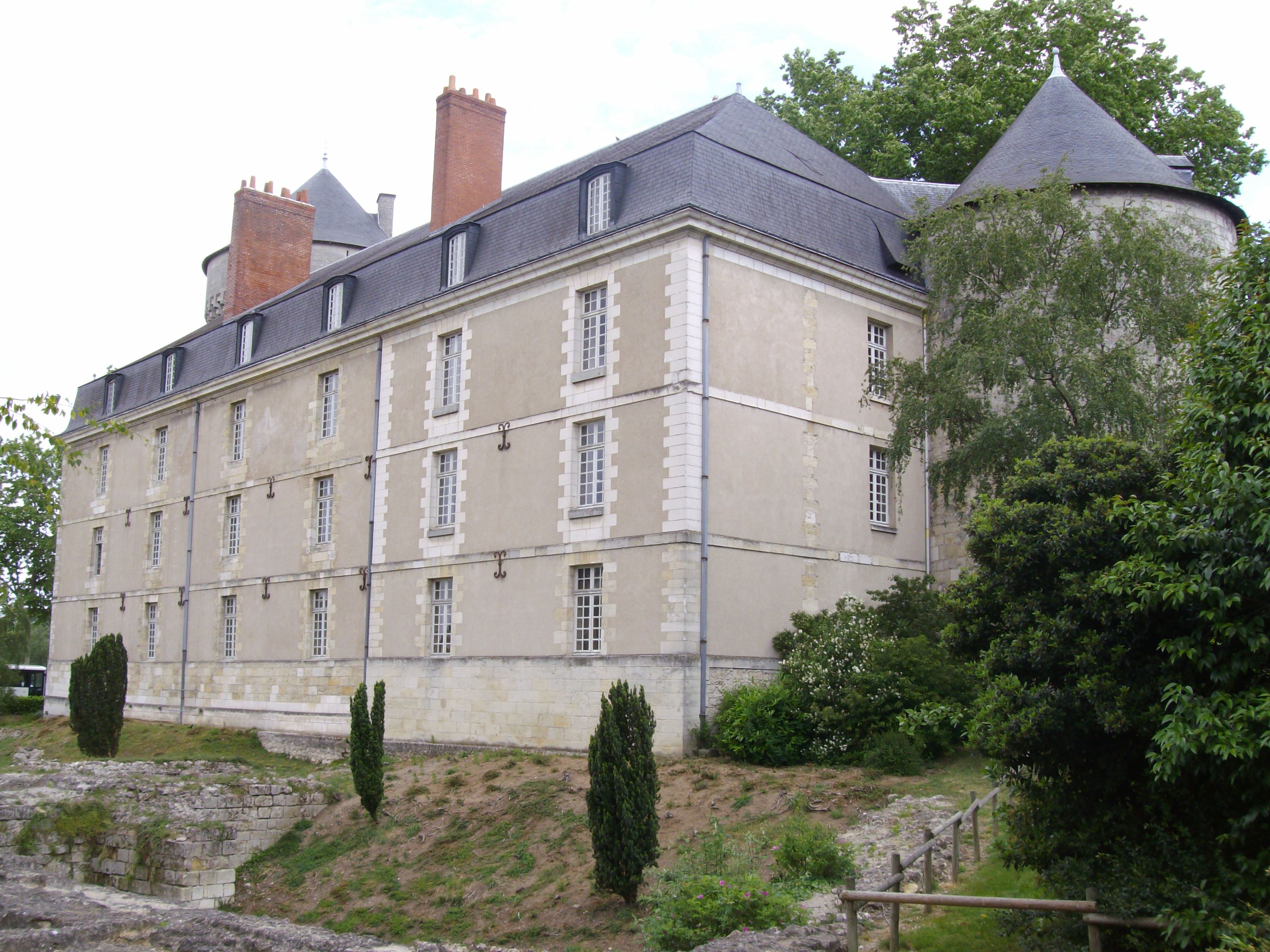 Le Chateâu de Tours